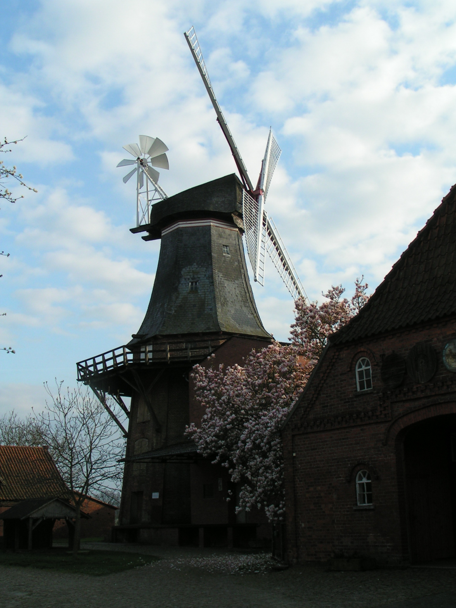 Windmühle Hoyerhagen (Landkreis Nienburg/Wser, Niedersachsen)